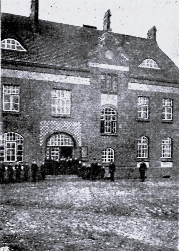 Das im Jahre 1901 erbaute Rettungshaus auf dem dritten Fischerbuden zu Lübeck. Vor ihm ist der Hausvater Henning mit einigen Zöglingen.